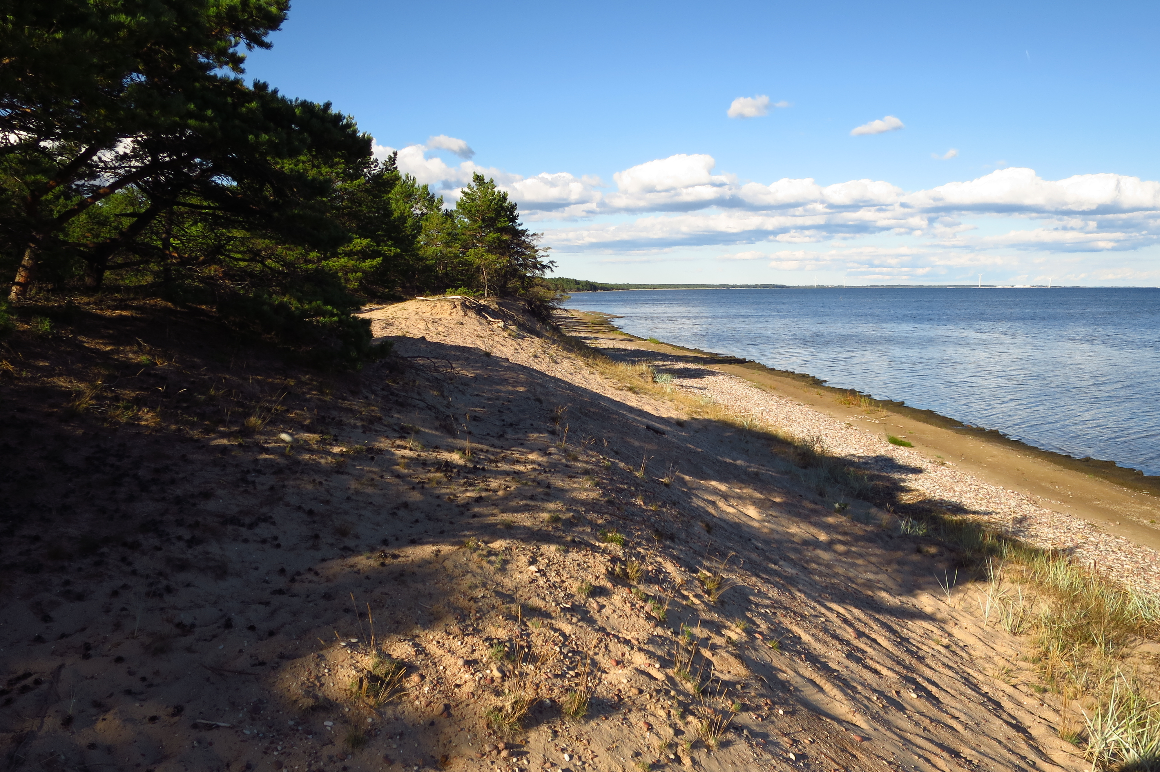 Luited Järve luidete maastikukaitsealal